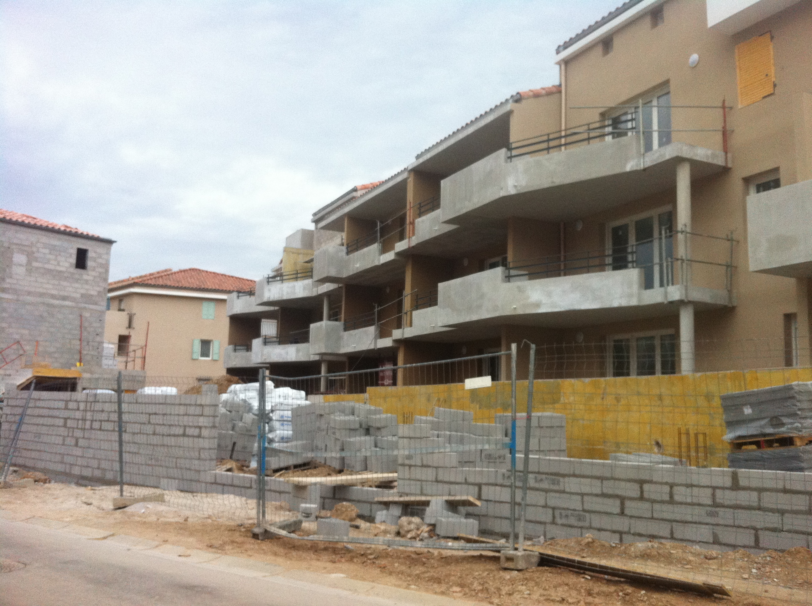 Logements en construction à Saint-Zacharie